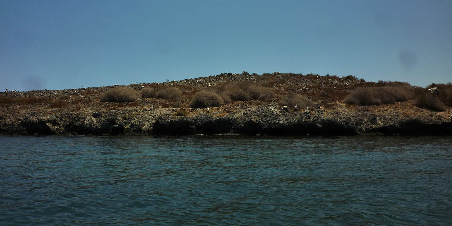 Isla del Sujeto en el Mar Menor, Cartagena (España)